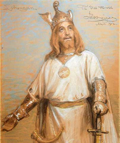 detail